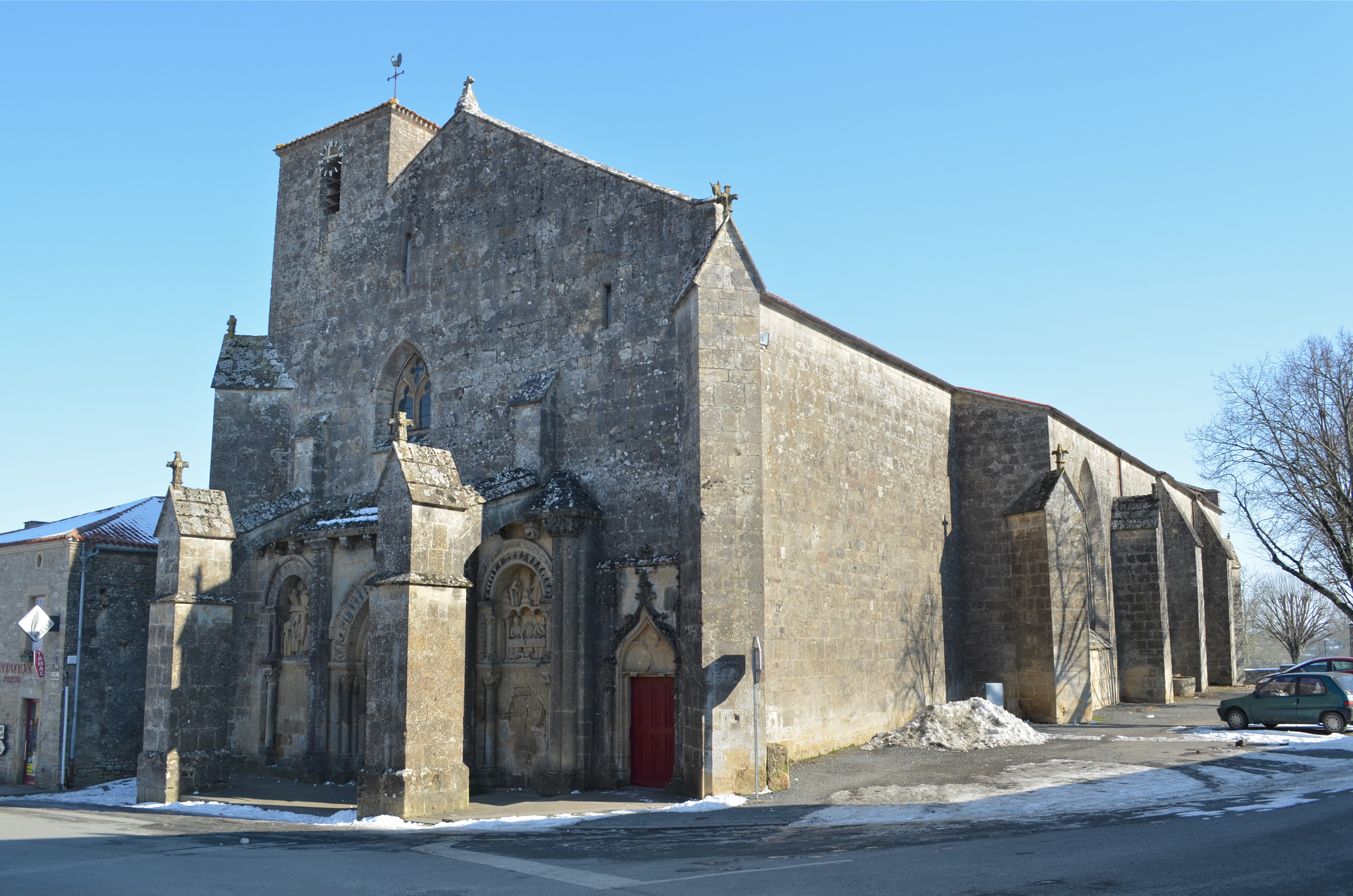 Eglise Saint-Hilaire - Foussais-Payré (Vendée)